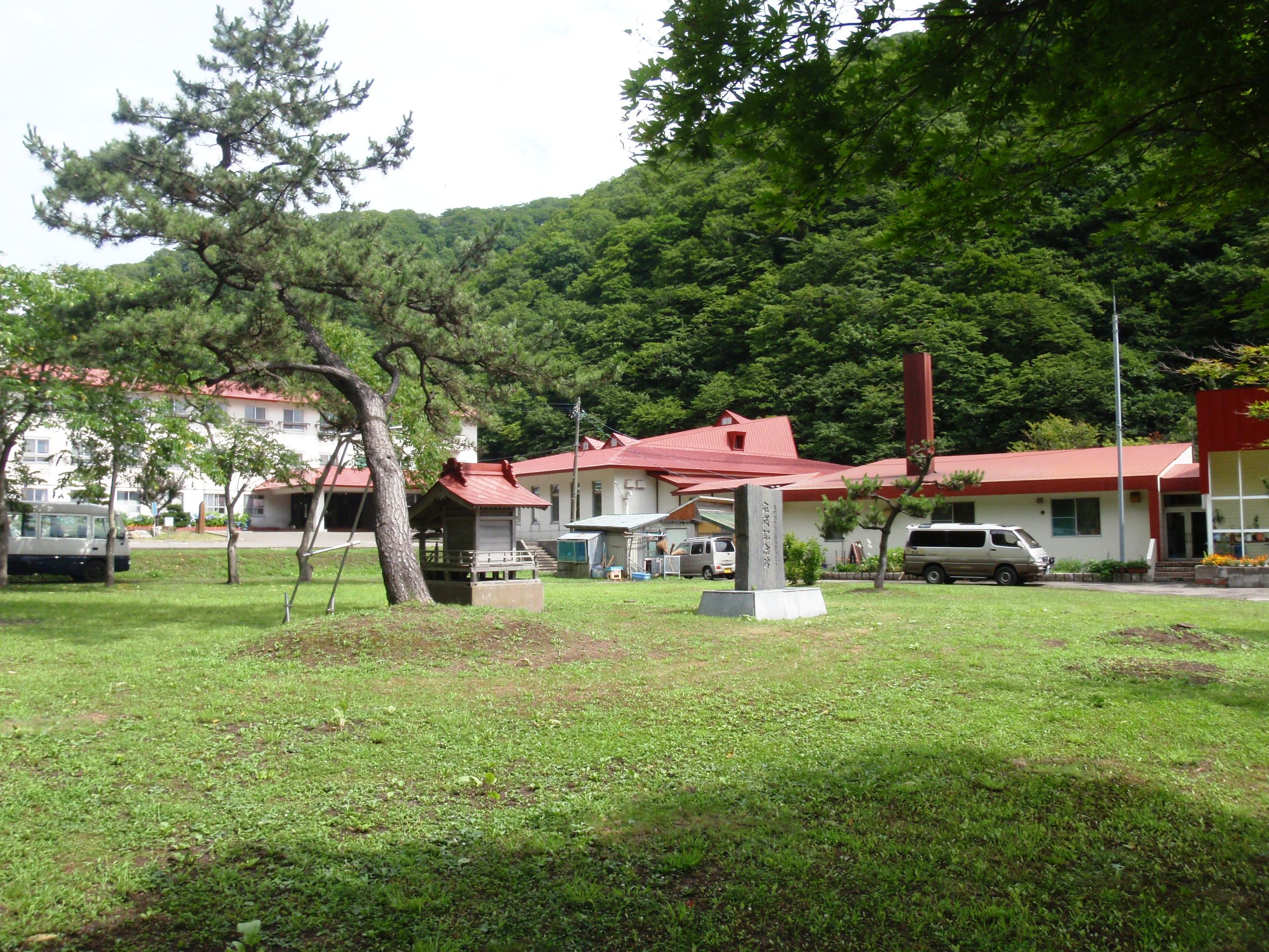 貝取澗温泉、左が国民宿舎あわび荘、右が大成国民温泉保養センター